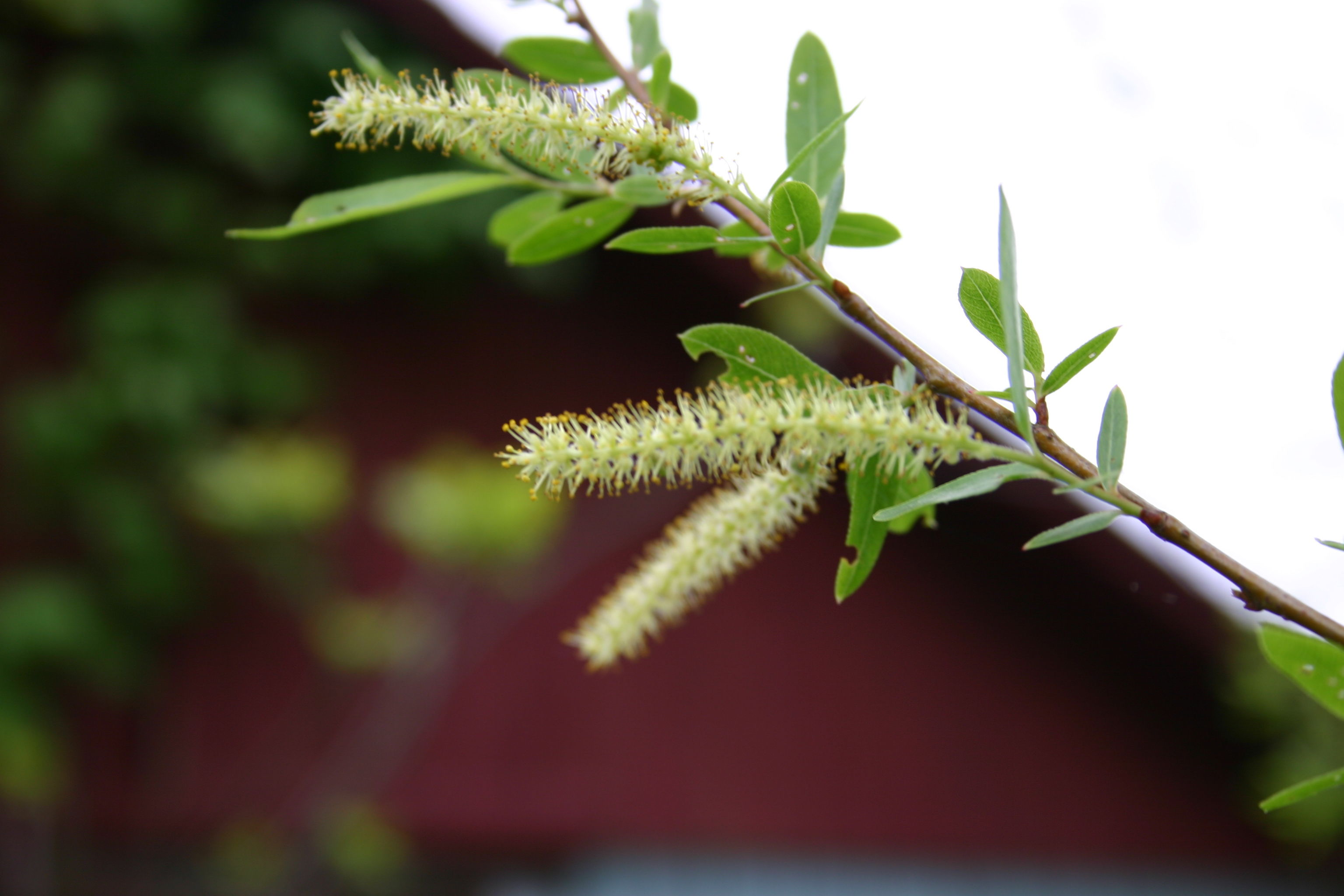 Salix nigra catkins